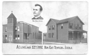 A Clevelandi Szent Imre római katolikus magyar templom és iskola képeslapon 1905 körül